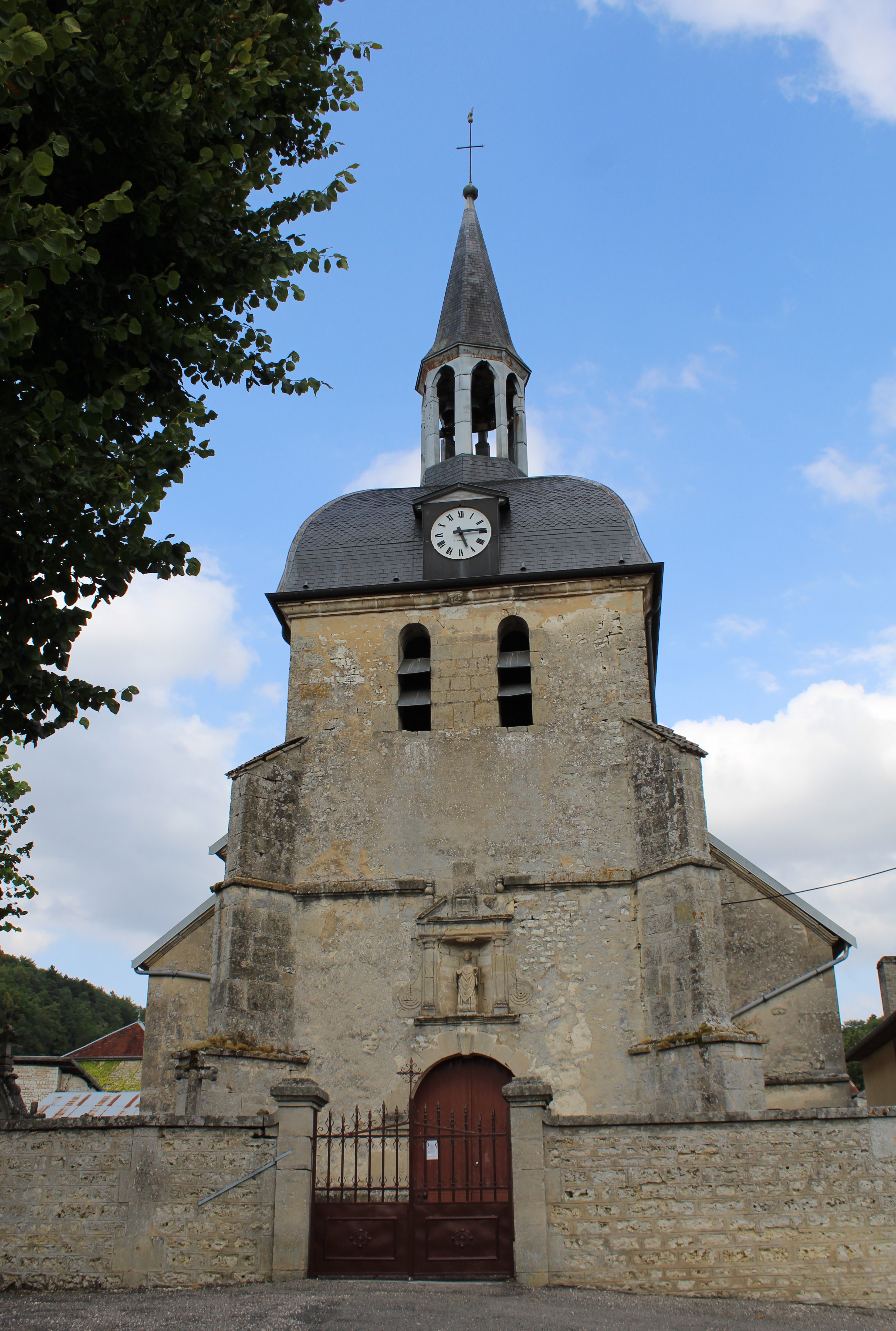 L'église